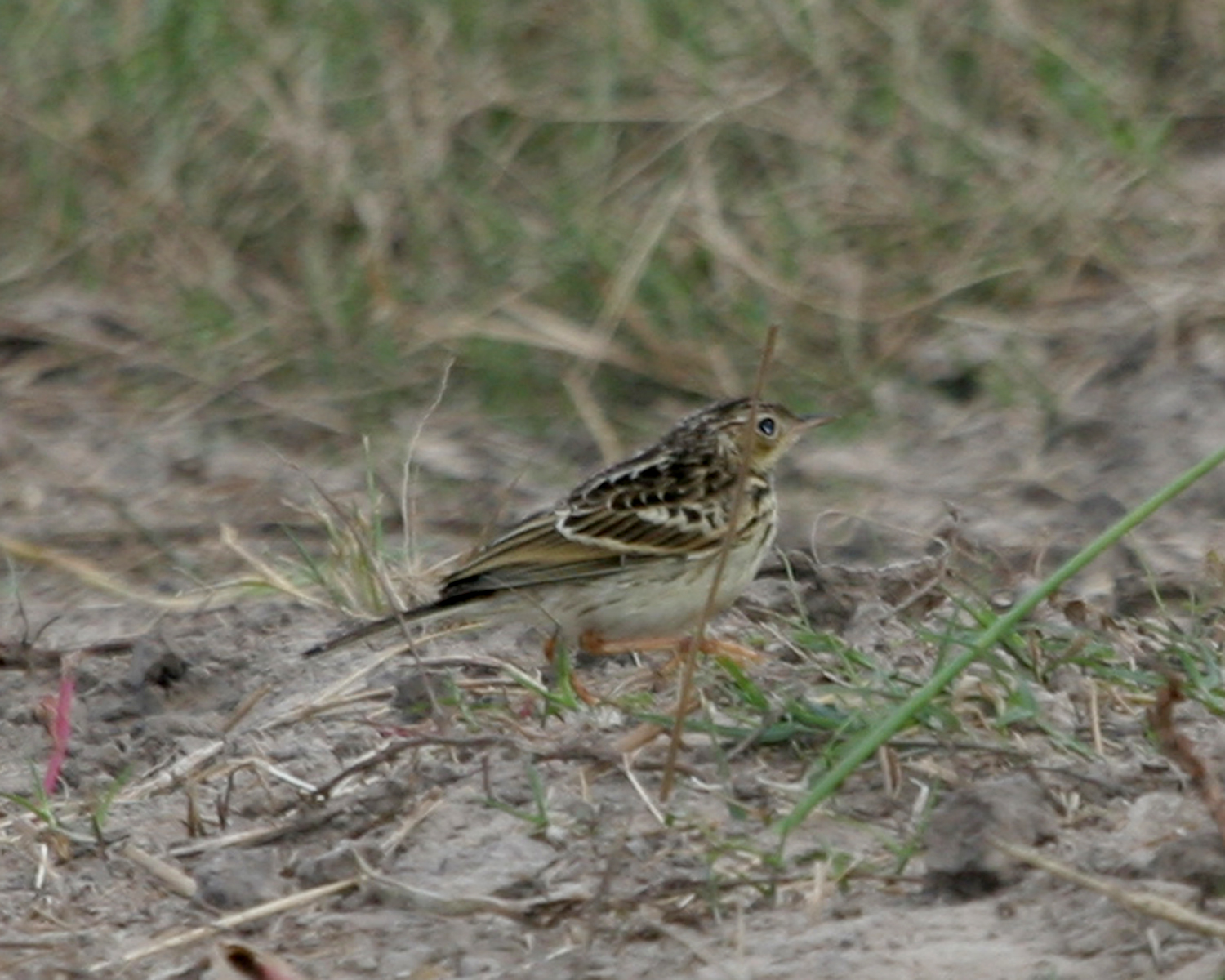 Correndera Pipit. Buenos Aires - Entre Rios area.